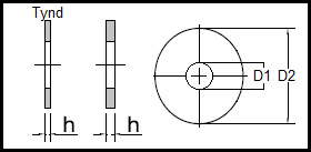 DIN 9021